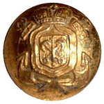 Речная поллиция